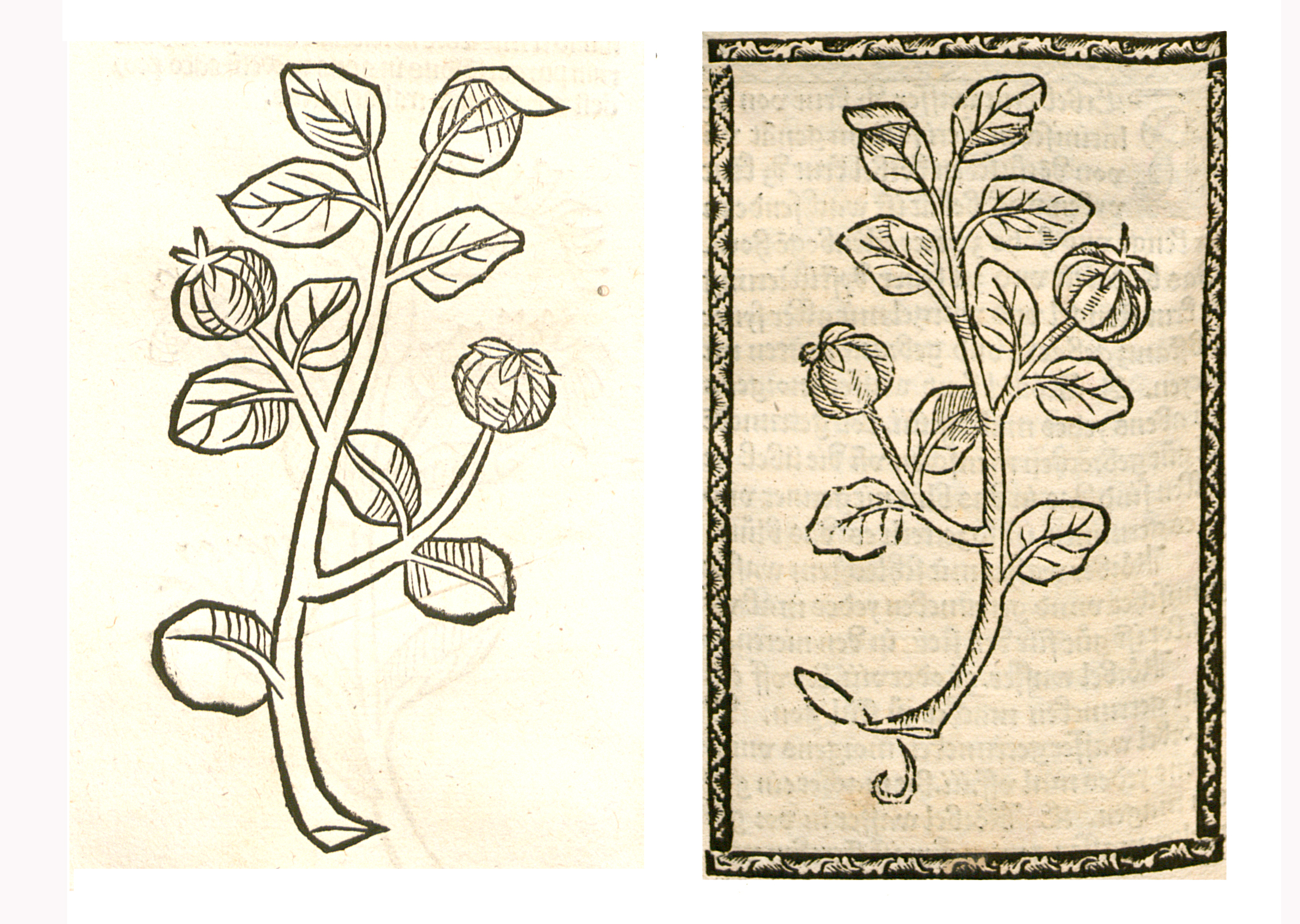 Abbildung von Kütten (Cydonia oblonga)